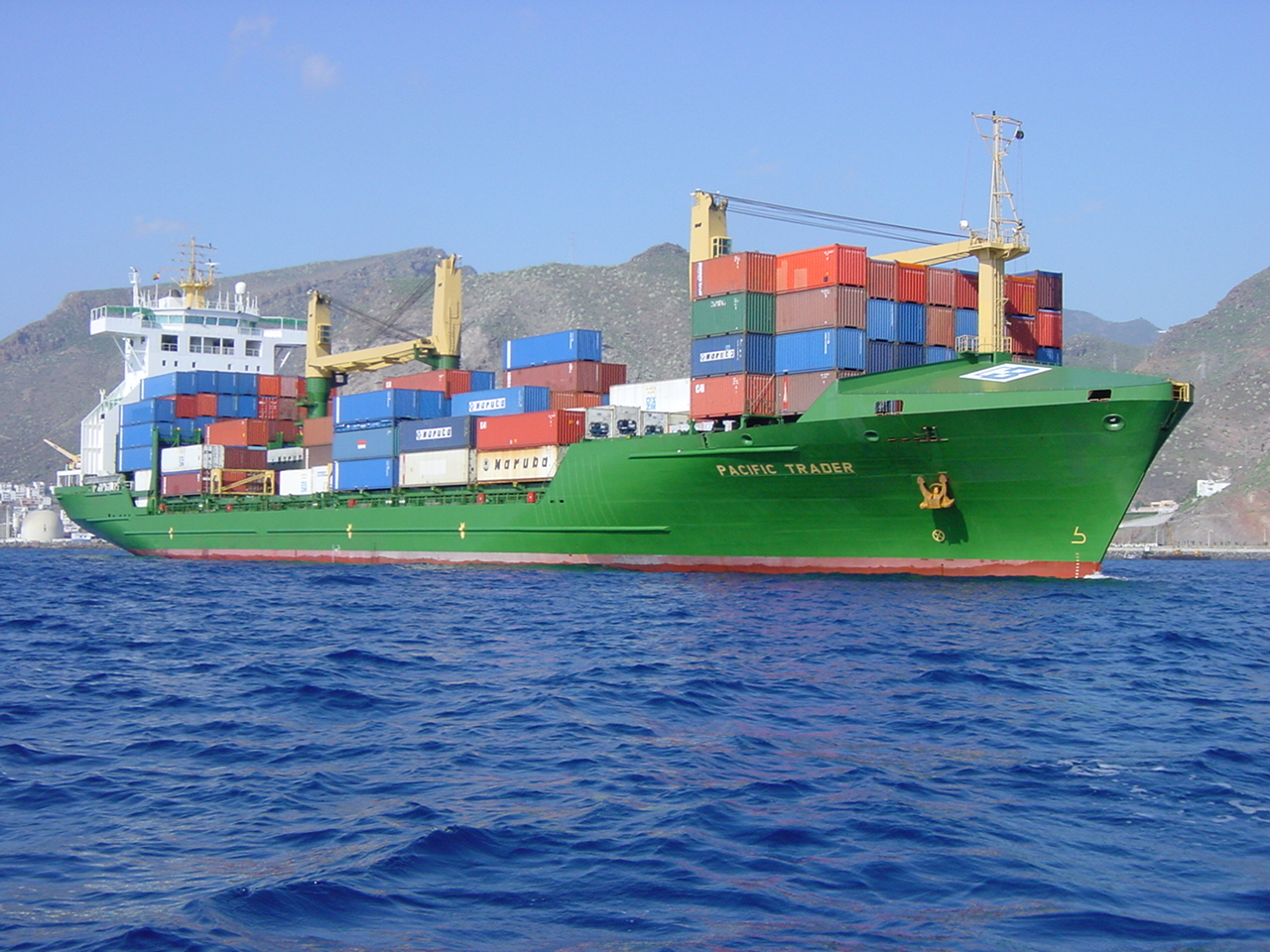 Containerschiff Pacific Trader Typ MTW CC 1600 der MTW Schiffswerft